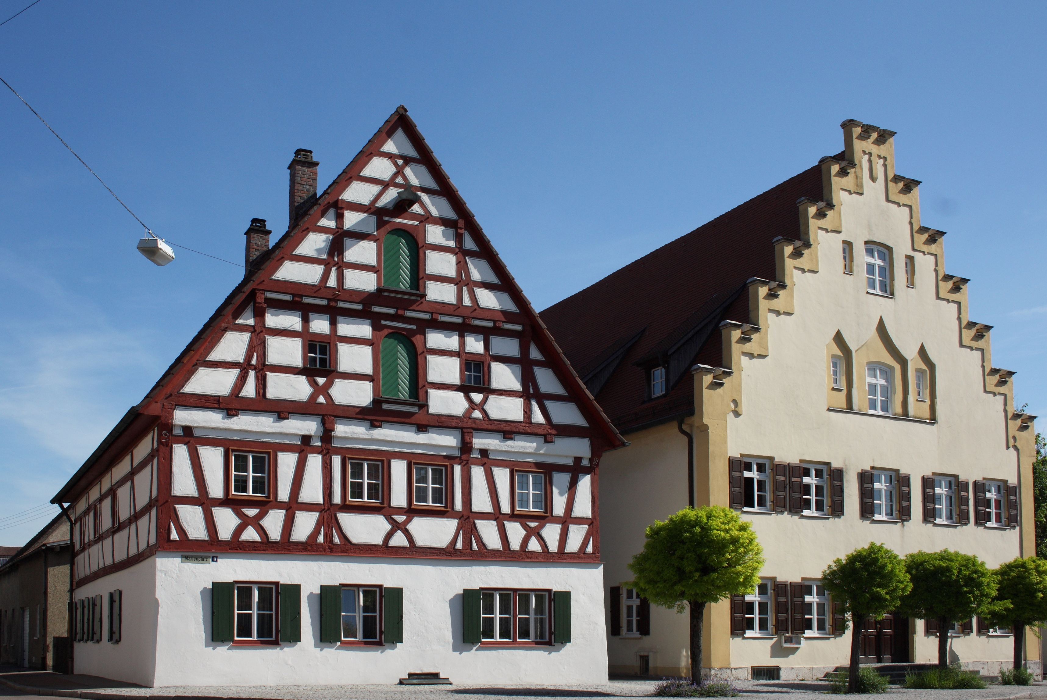 Fachwerkhaus Marienplatz 5 und Rathaus Marienplatz 6 in Wittislingen im Landkreis Dillingen an der Donau